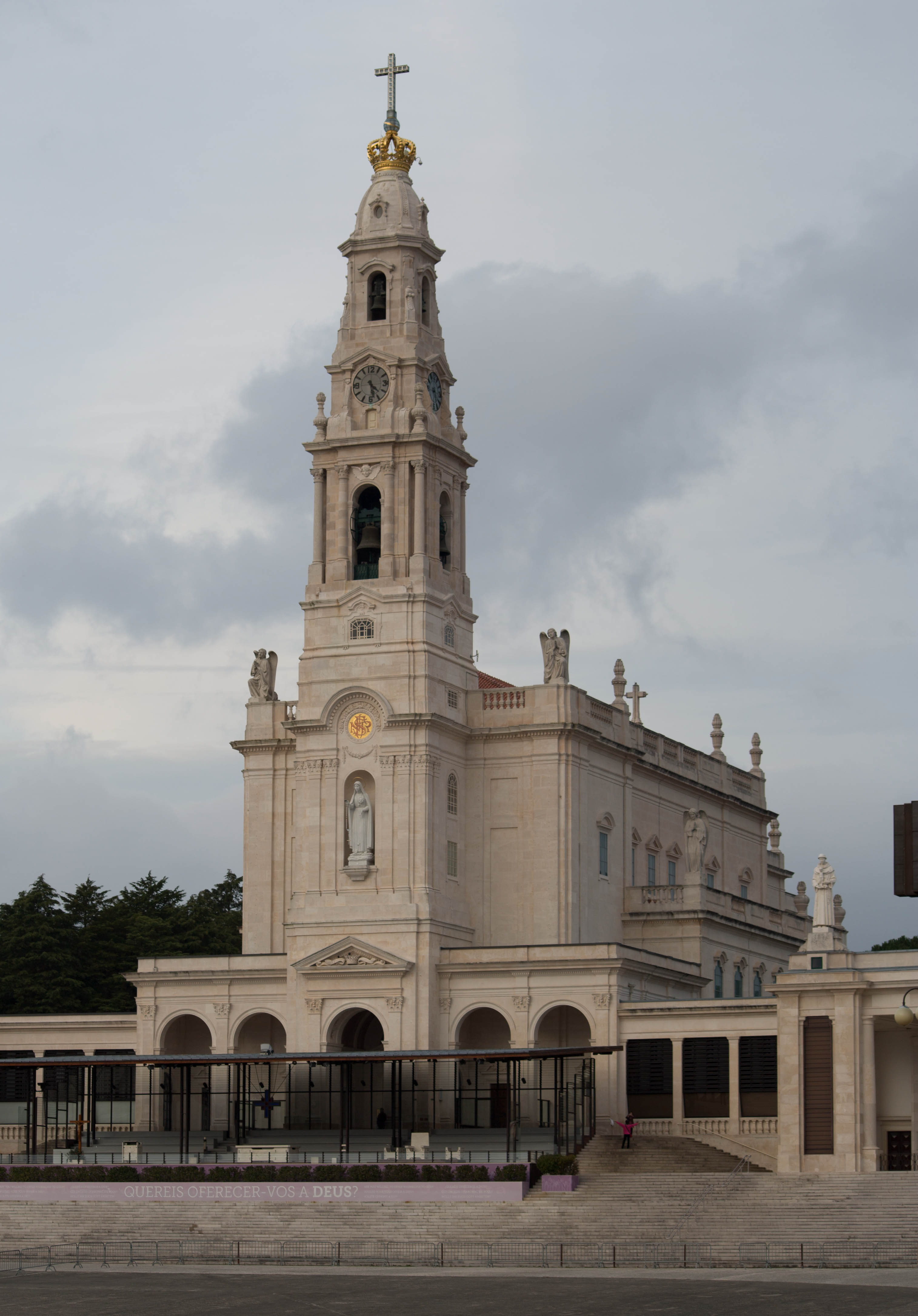 F29A5282